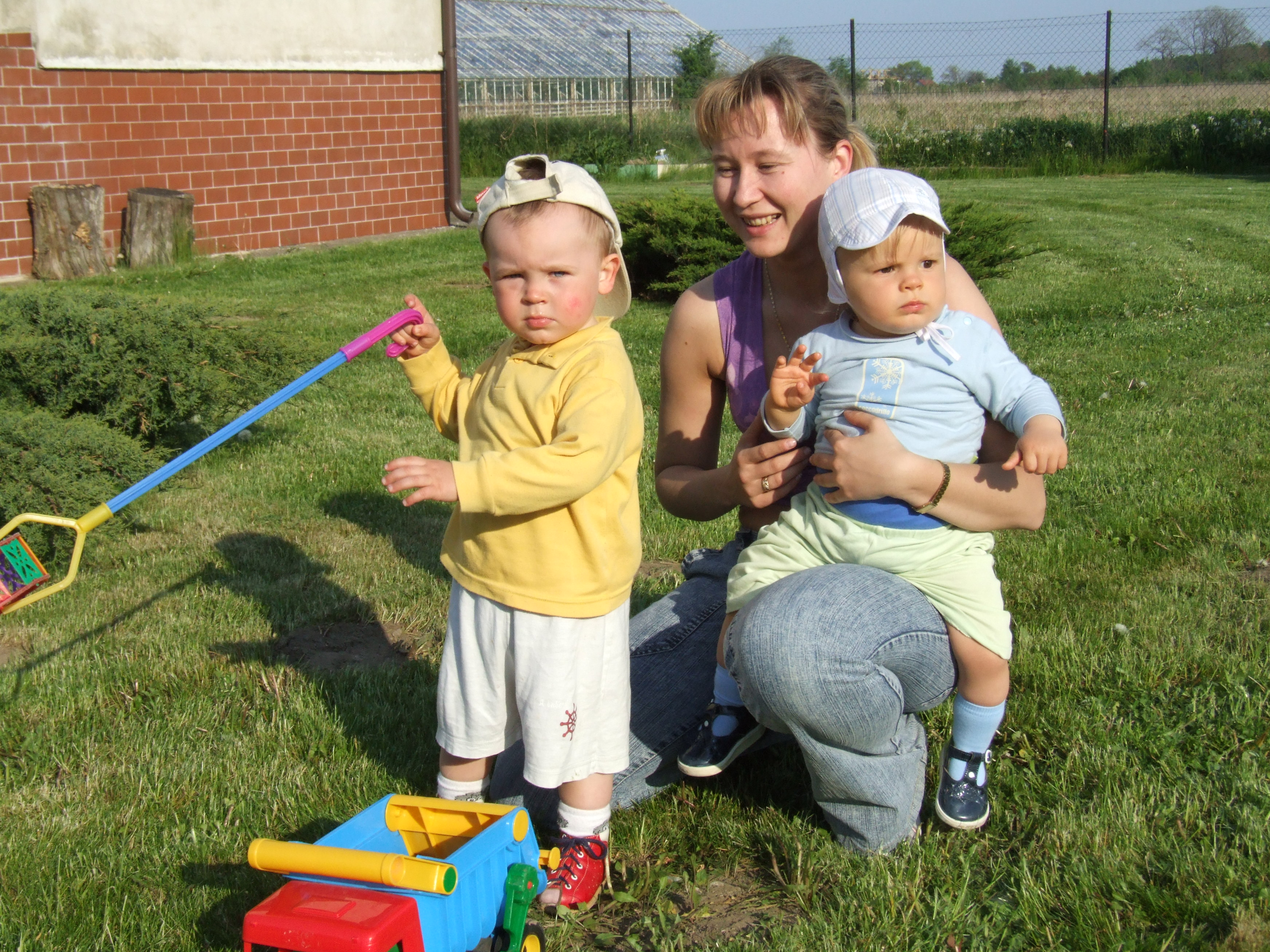 Aga z Szymonem i Krystianem